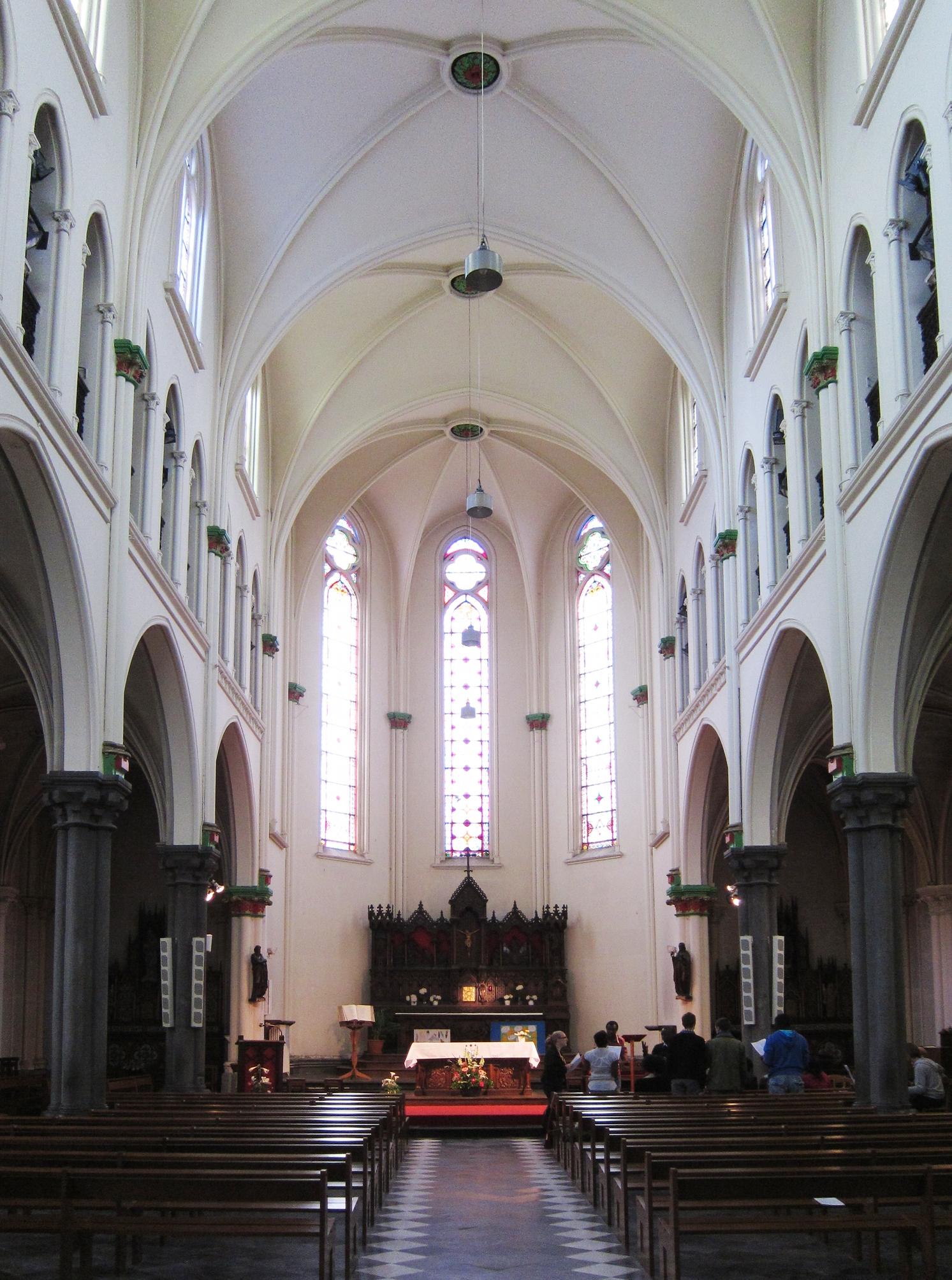 La nef de l'église Saint-Denis d'Hellemmes